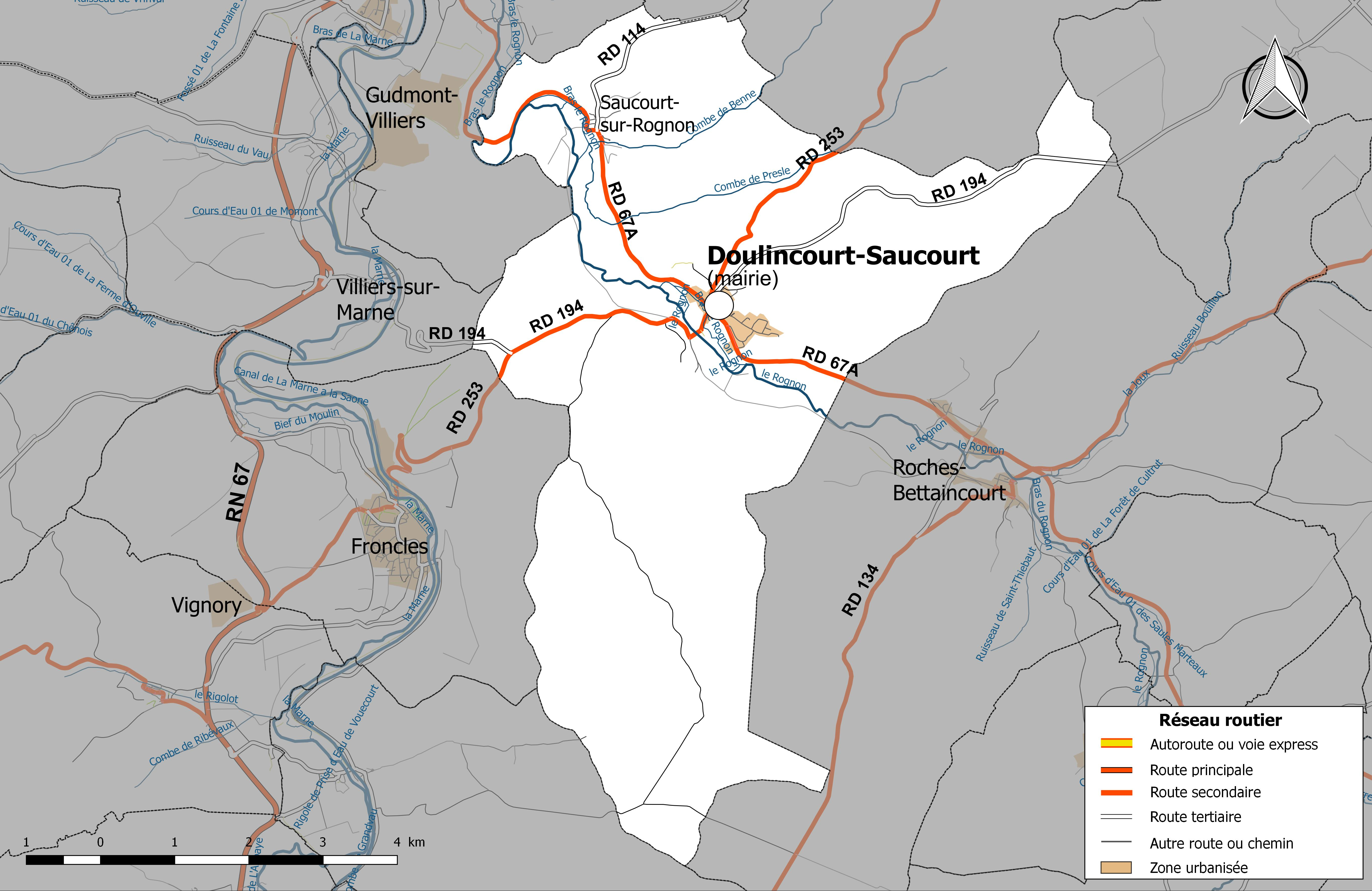 Carte routière de la commune de Doulaincourt-Saucourt.